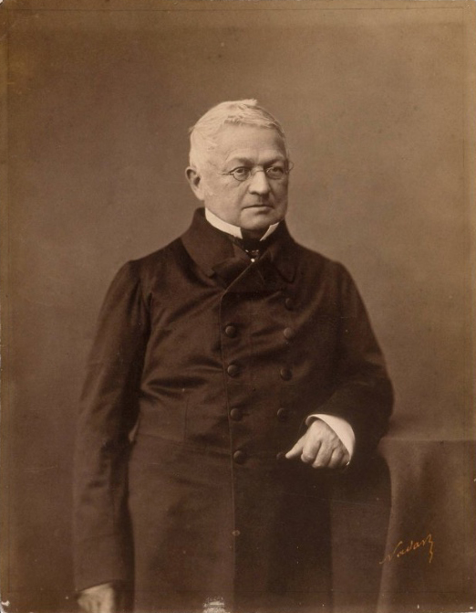 Portrait d'Adolphe Thiers par Nadar